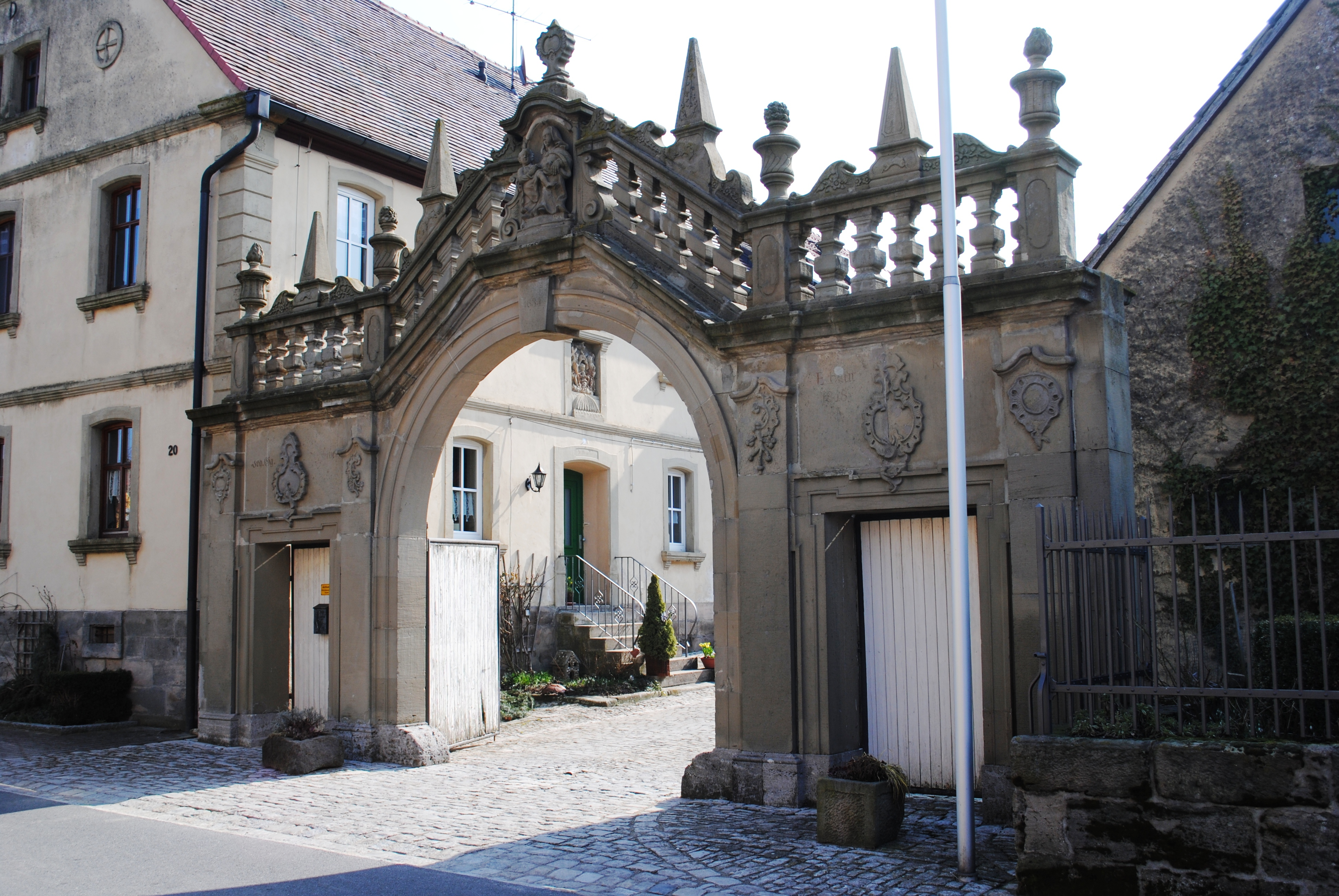 Portal, Gräfenneuses, Geiselwind, Barockportal der ehem. Kartause Ilmbach, um 1750, 1848 hier aufgestellt.